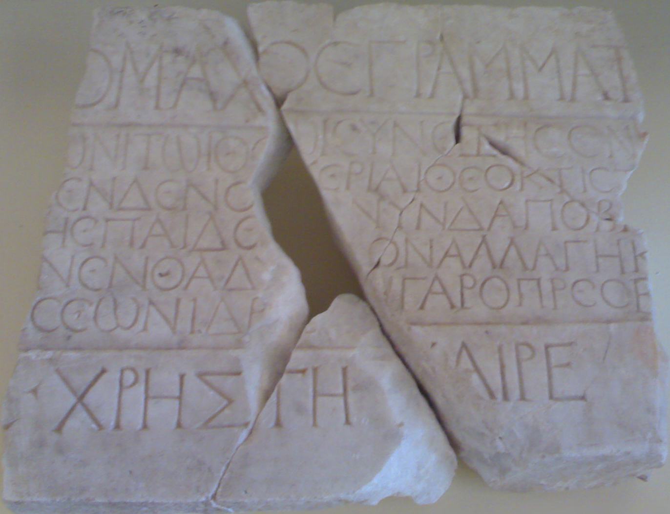 Rione Casolla, Nocera Inferiore - Epigrafe con iscrizione greca: Teoctistos. I-II sec. d.C.